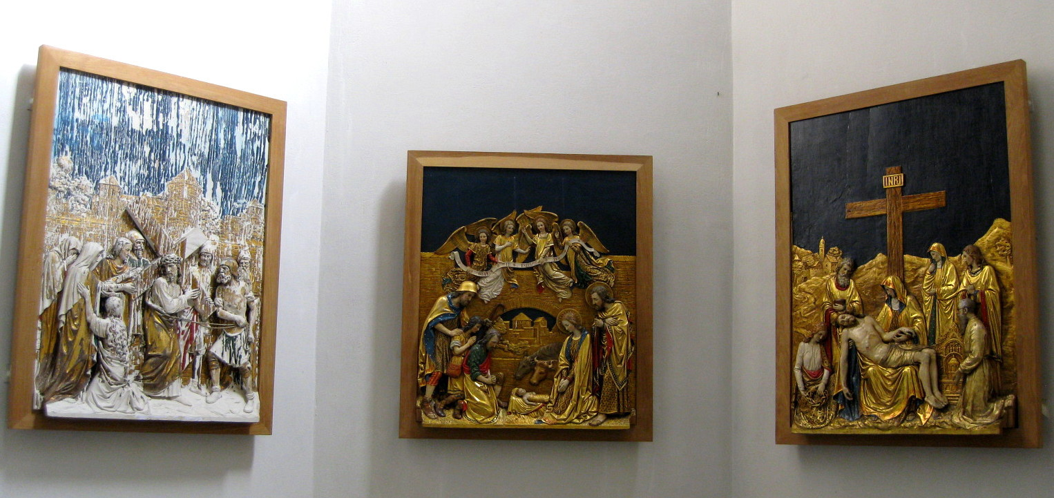 Altartafeln des ehemaligen Hochaltars in der Osnabrücker Herz-Jesu-Kirche, 1912 geschaffen von dem Osnabrücker Bildhauer Heinrich Seling (1843-1912)